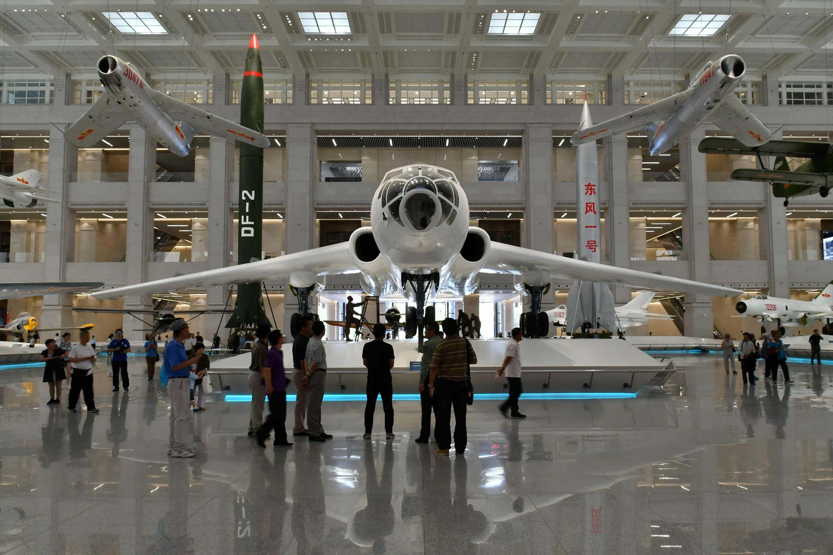 中国人民革命军事博物馆一层中央大厅“兵器陈列”展区。